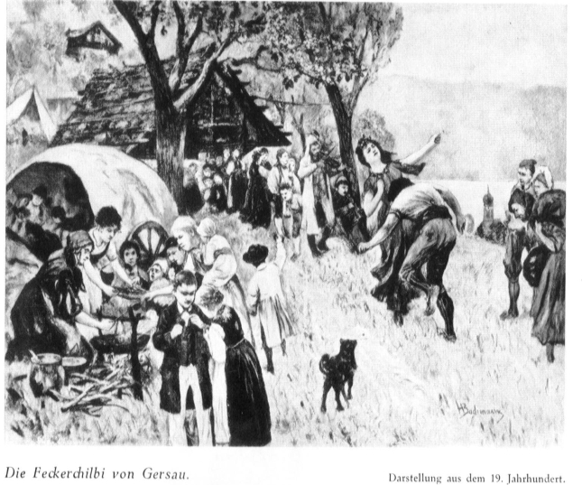 Feckerchilbi, Fest der Jenischen, Gersau, Schweiz, 19. Jahrhundert(Bild von 1902)